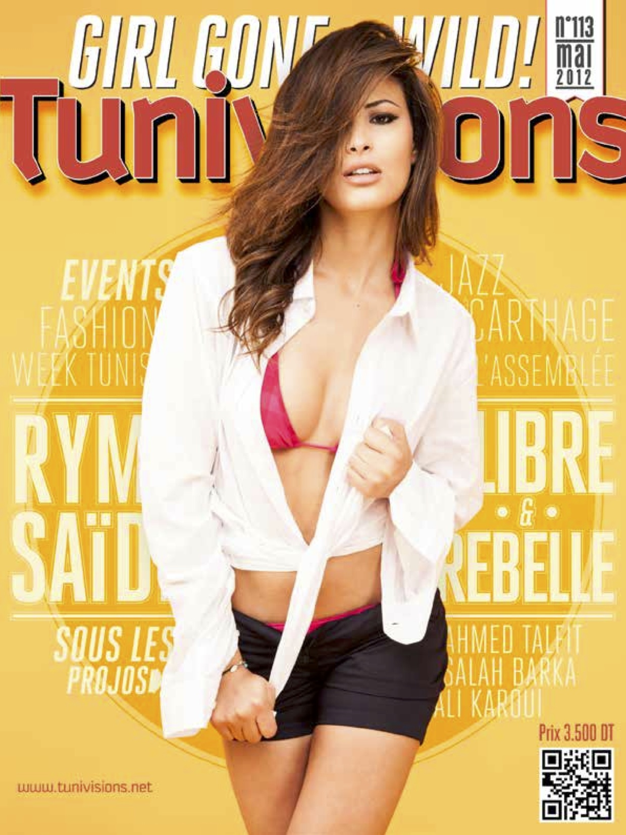 Couverture du numéro 113 du magazine tunisien Tunivisions.